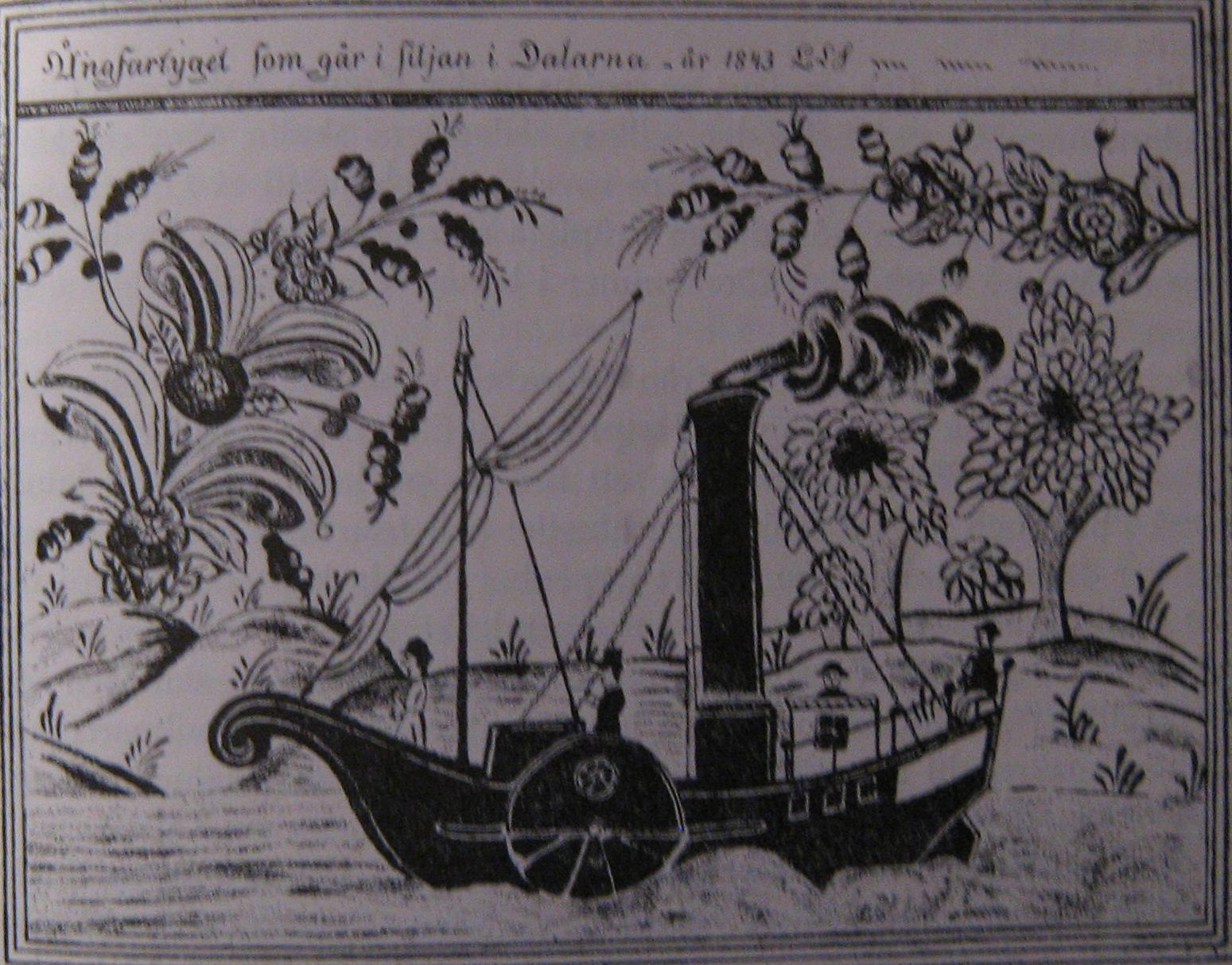 "Ångfartyget som går i siljan i Dalarna år 1843" ur Ernst Bosaeus "Nytt tafvelgalleri från stugor i Dalom" efter oljemålning av Sömskar Lars Larsson. 1843-1909